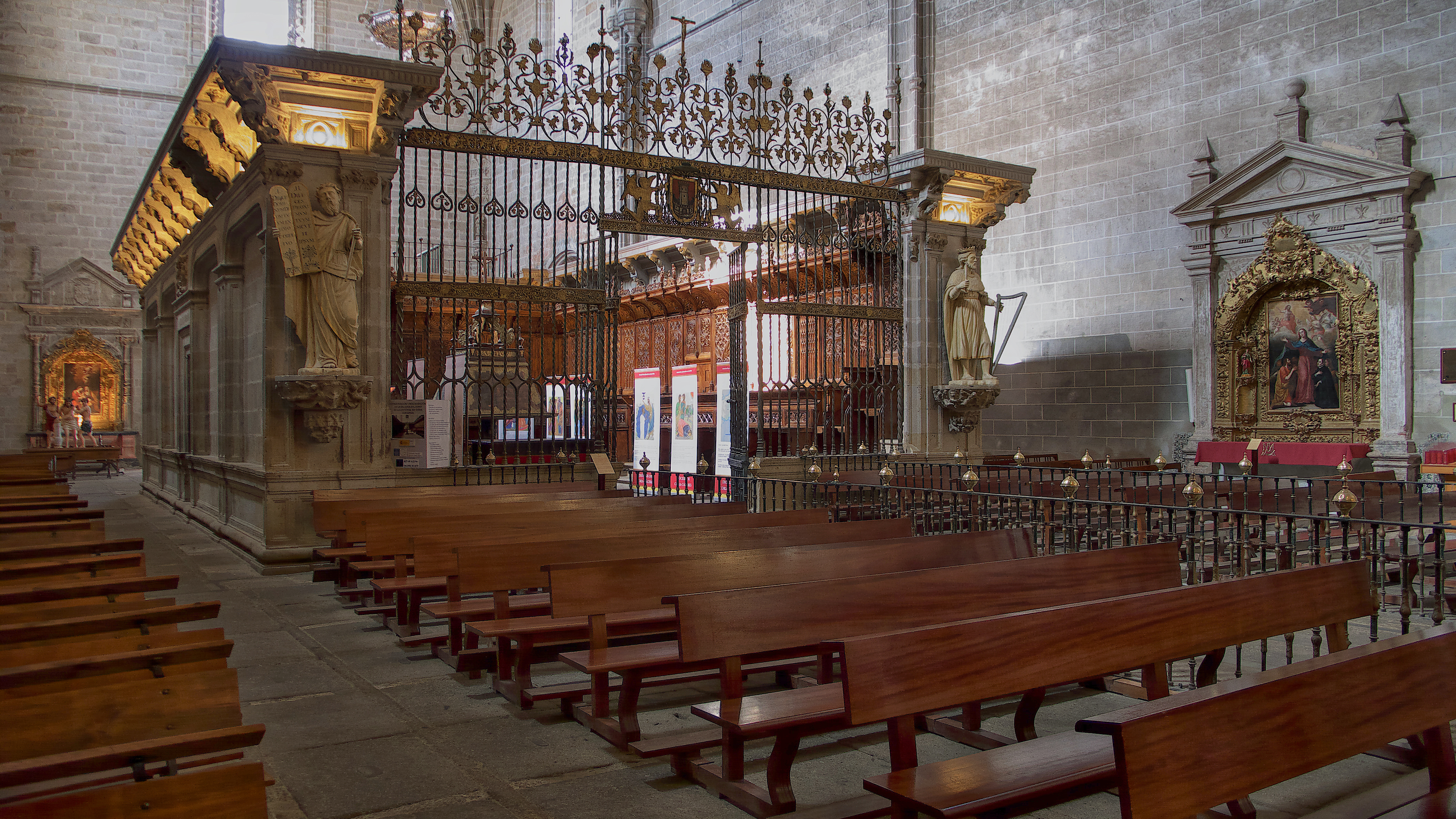 Interior de la Catedral de Coria (Cáceres).